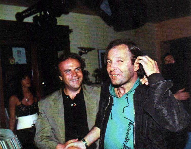 1990 Riccione